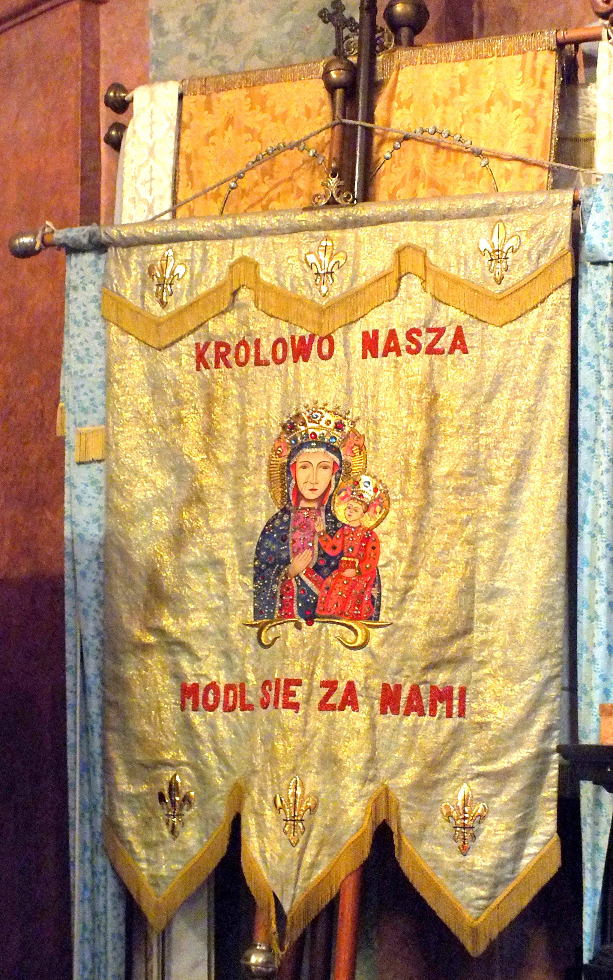 Jasna Góra, sztandar procesyjny